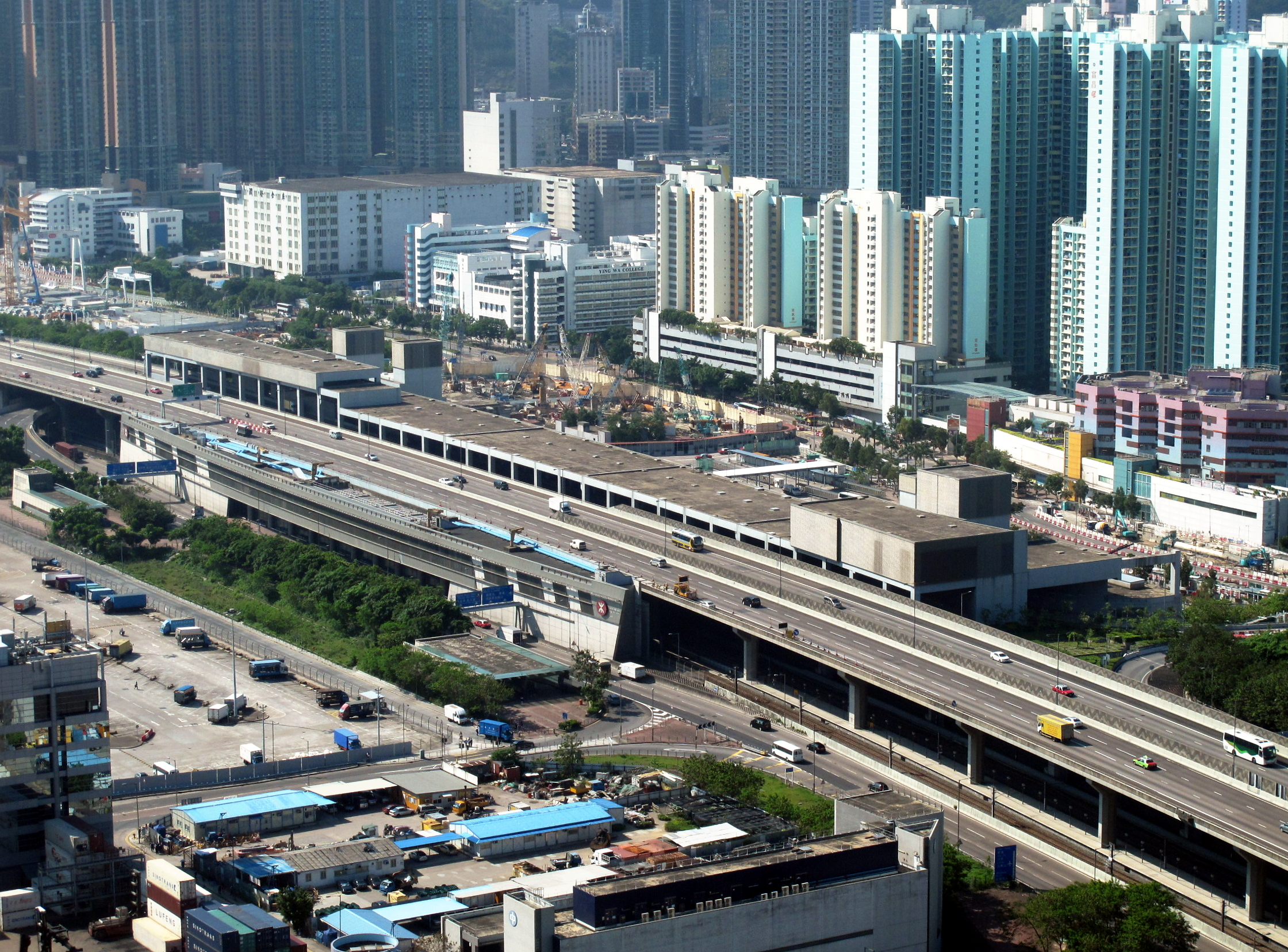 Nam Cheung Station Site 南昌站